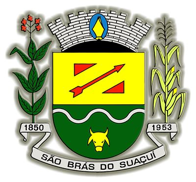 Brasão de Armas do município de São Brás do Suaçuí, Minas Gerais, Brasil.